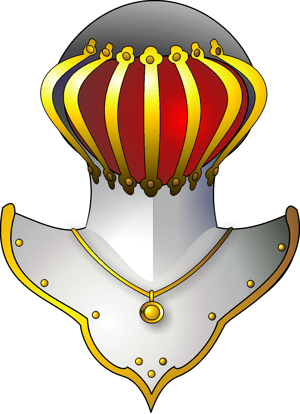 Marquis Helmet